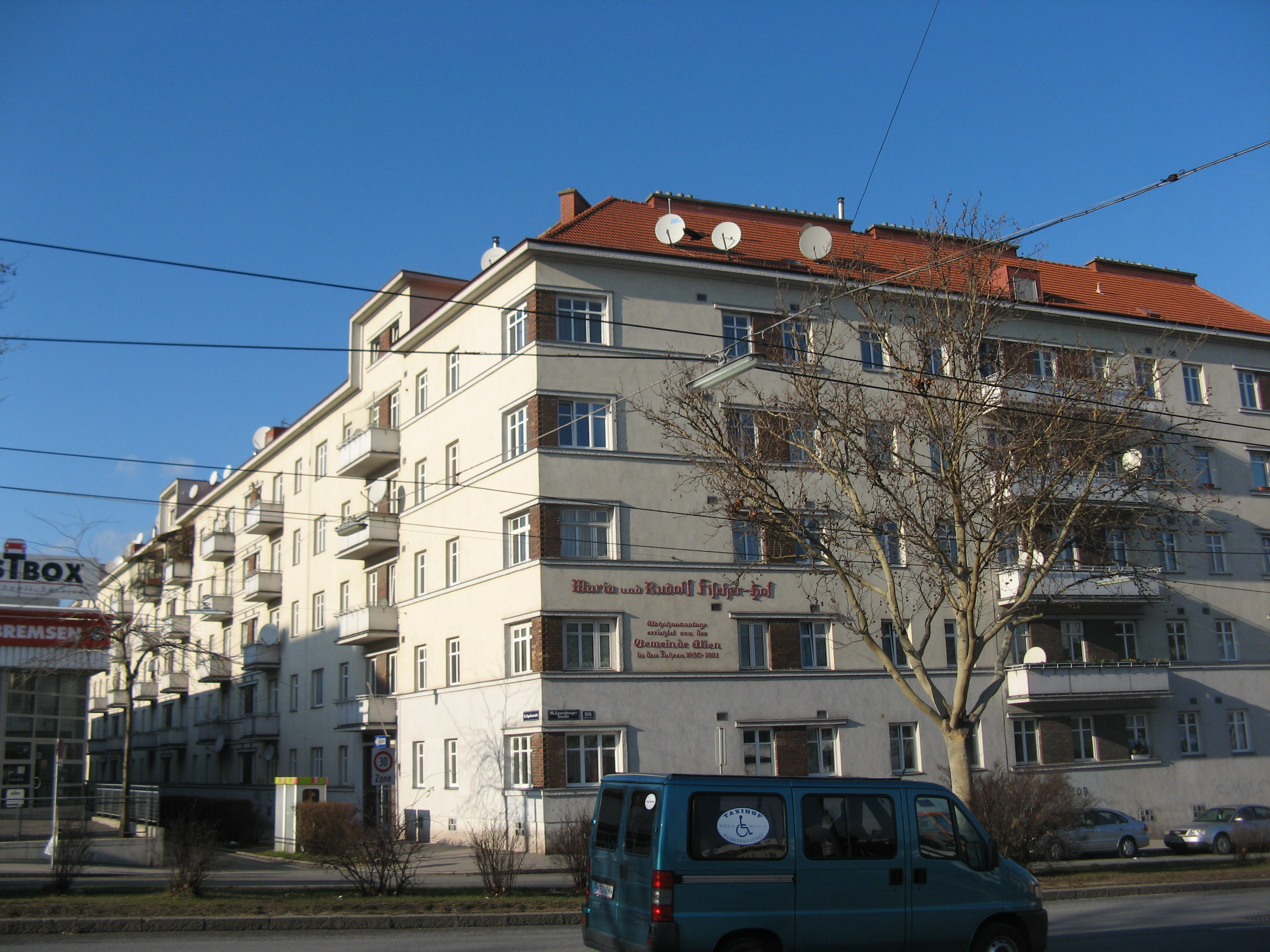 Maria-und-Rudolf-Fischer-Hof (1930) von Konstantin Peller, Laxenburger Straße 98, Wien-Favoriten